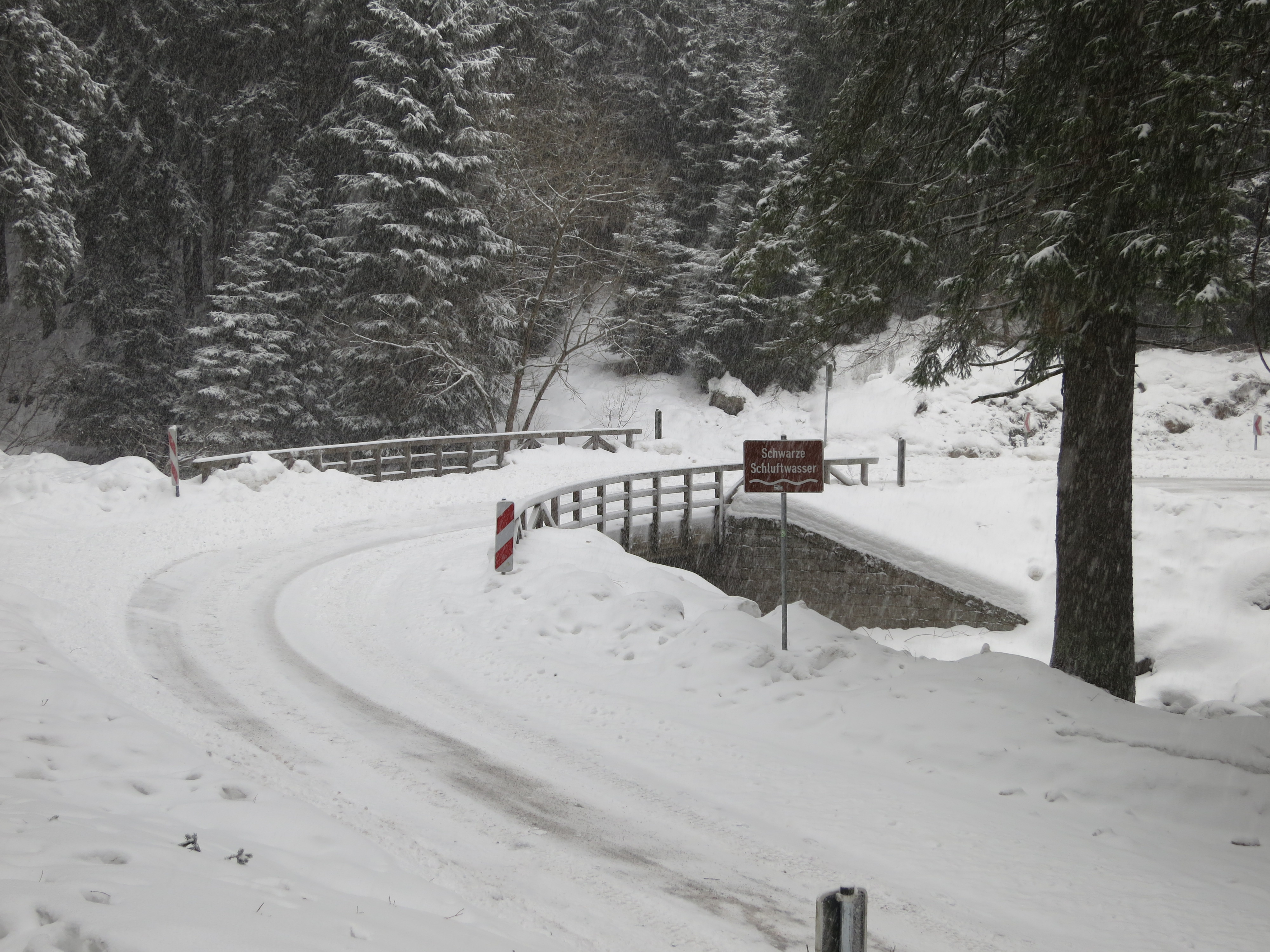 Die Schwarze Schluftwasser an der ersten Unterquerung der Brockenstraße.